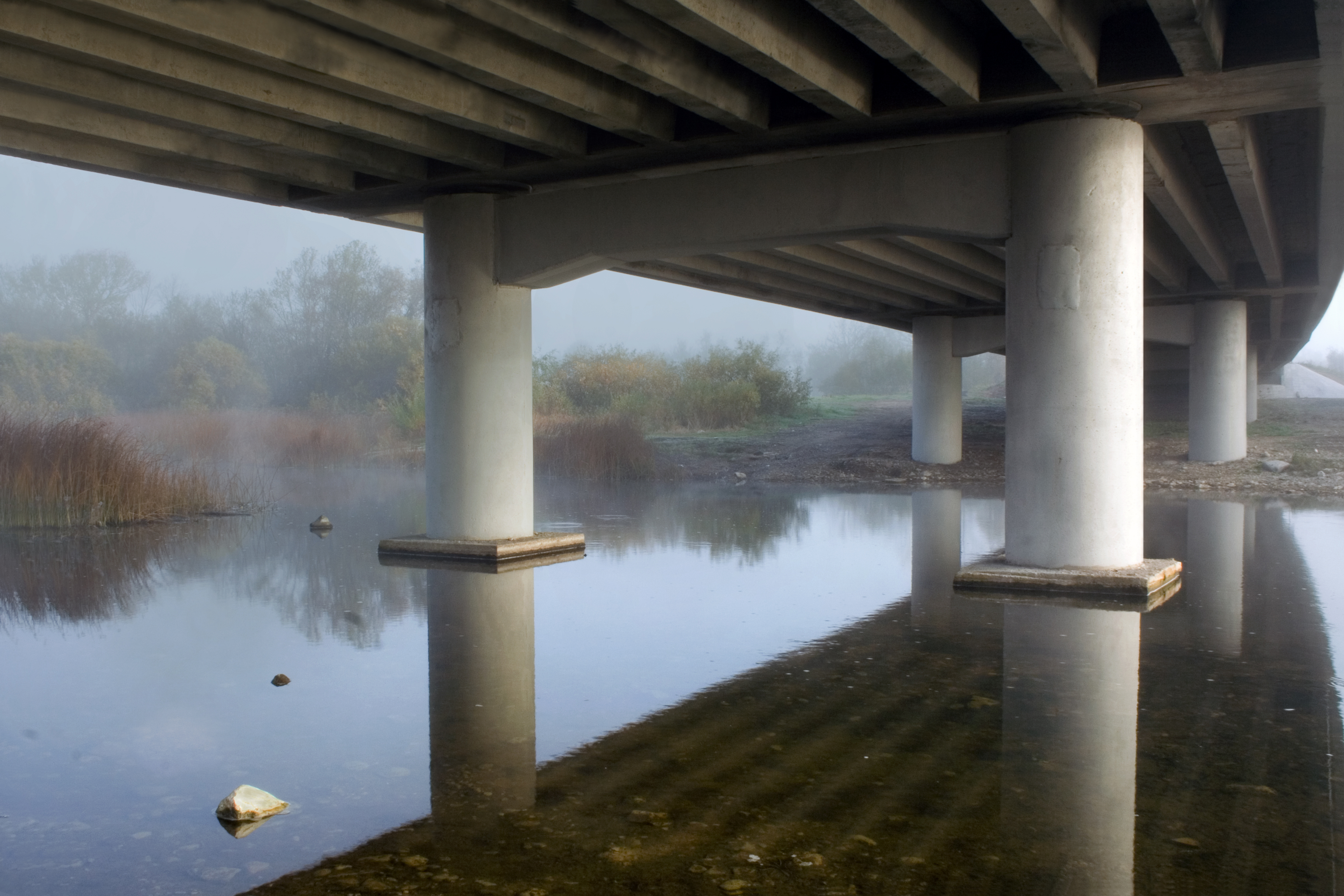 Kasari jõgi silla all